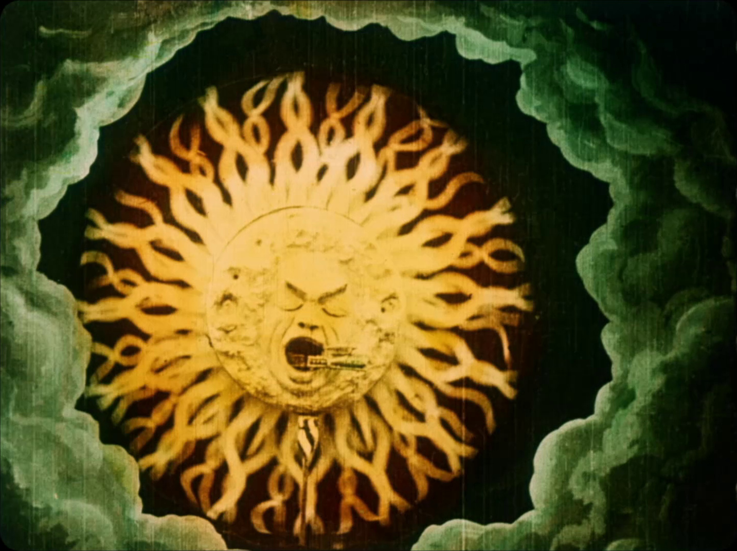 Méliès, Le voyage a travers l'impossible1904 colorizée 20